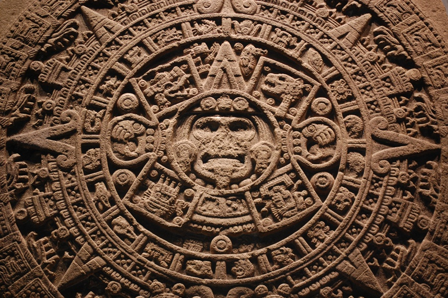 Piedra del Sol. Museo Nacional de Antropología, México. Arte azteca / mexica.